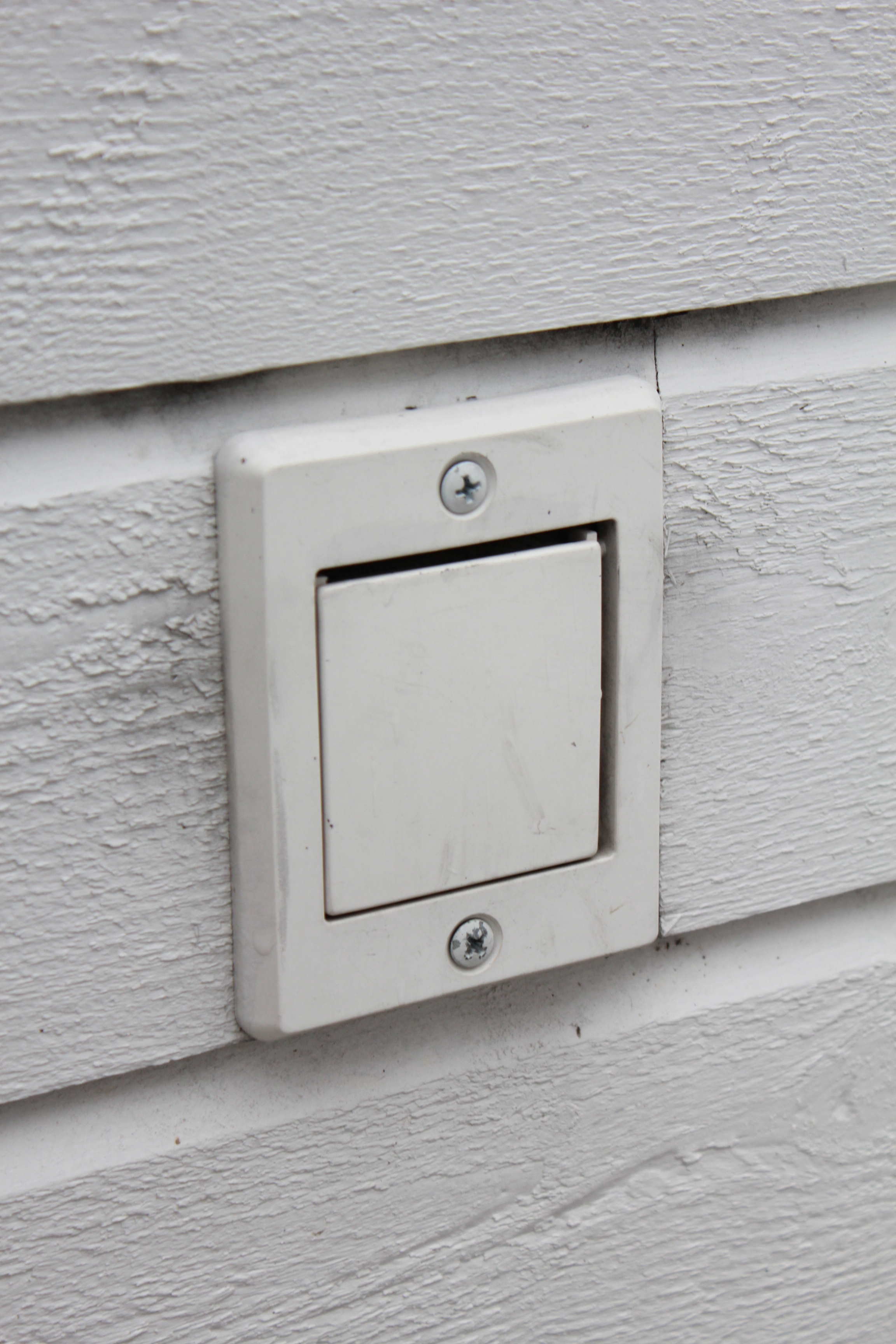 Avløpsventil for sentralstøvsuger.